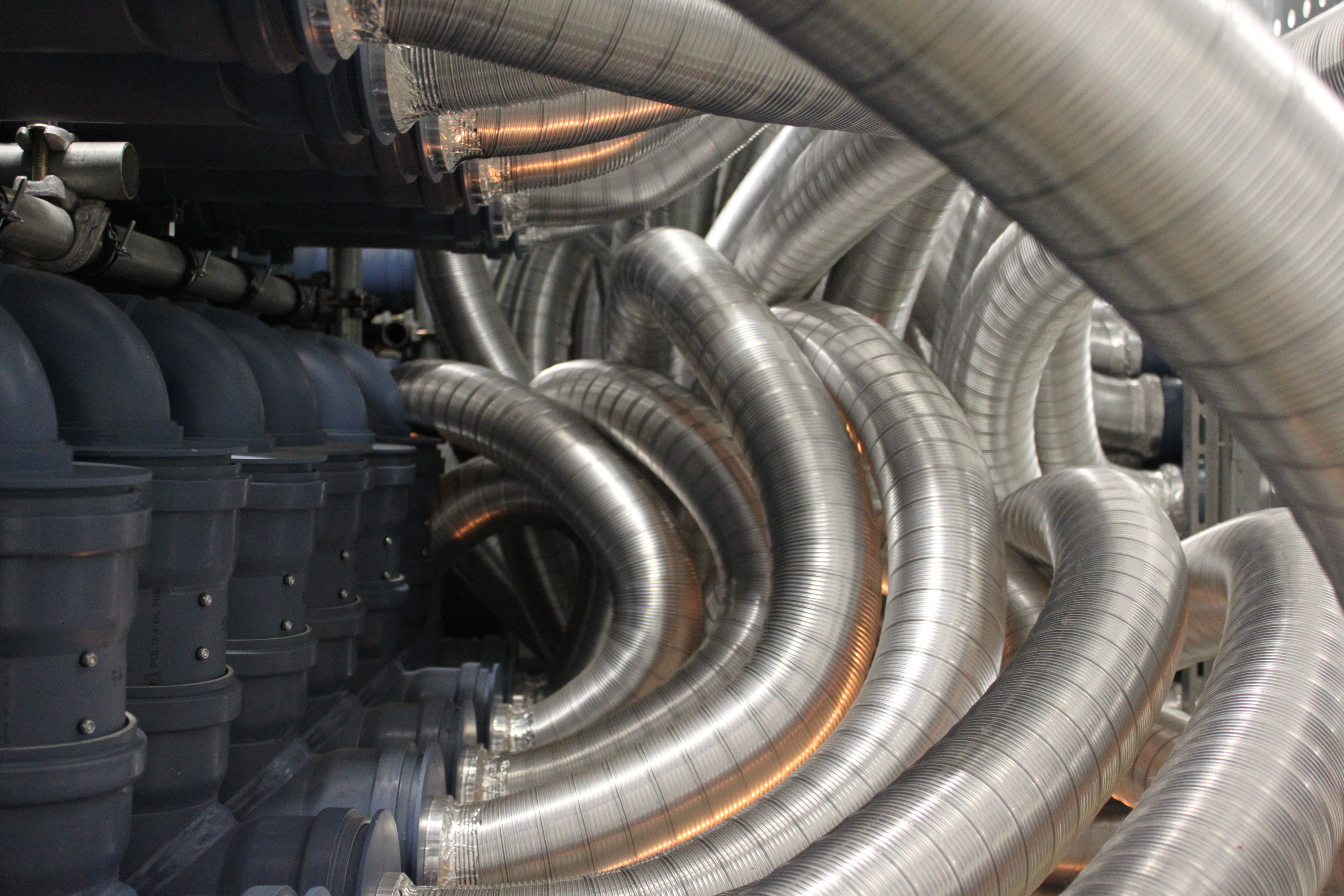 Geruchsorgelinneres im Brückenraum des Ursulinenhofes, Zugang über eine Brücke vom OK aus, Verbindungsrohre von den Duftkammern zum Auslassbereich